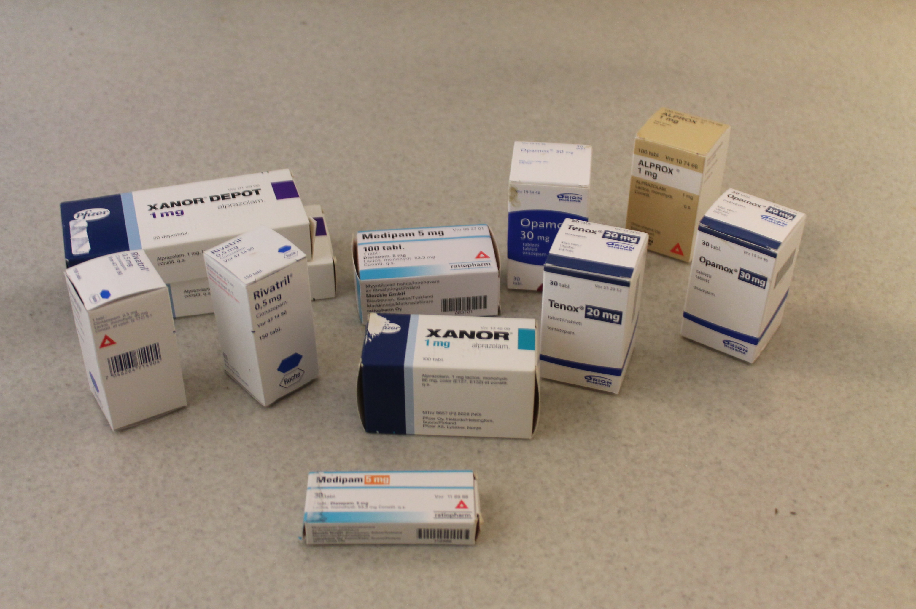 Bentsodiatsepiineja